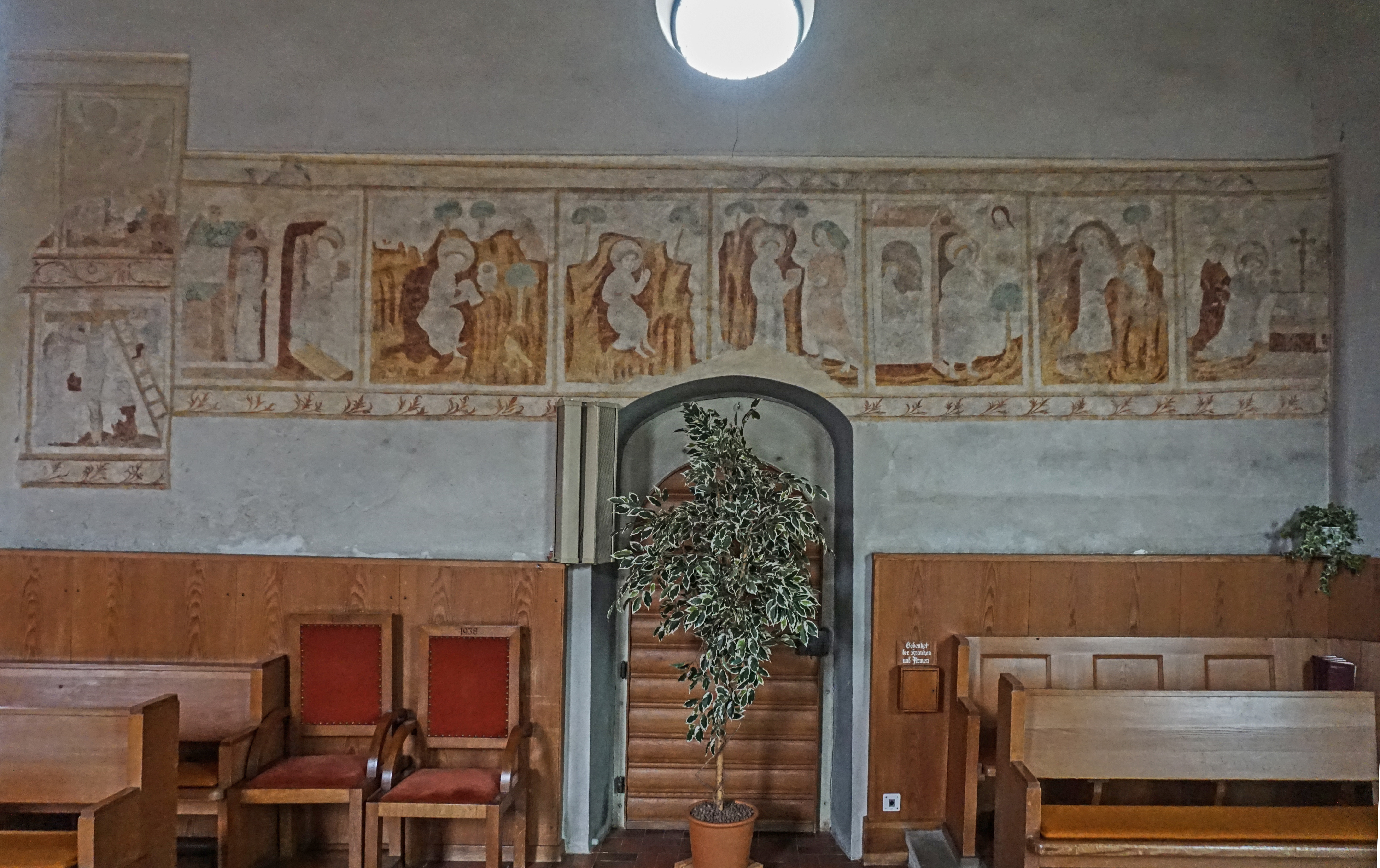 Fresko 15. Jahrhundert: Übersicht Benediktslegende